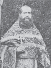 Metodi Chekov